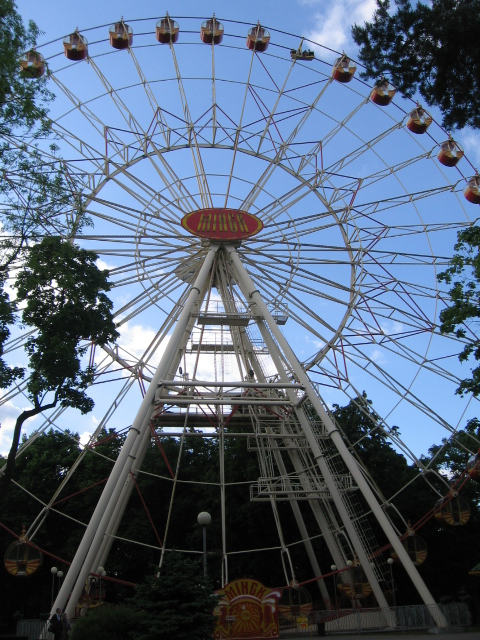 Минск, Парк Горького, колесо обозрения